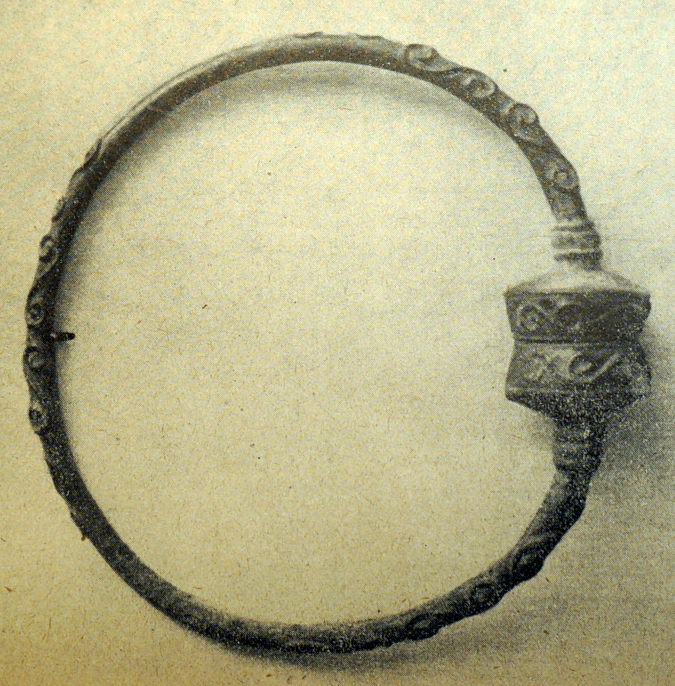 Lavannes tourque mont de la fourche